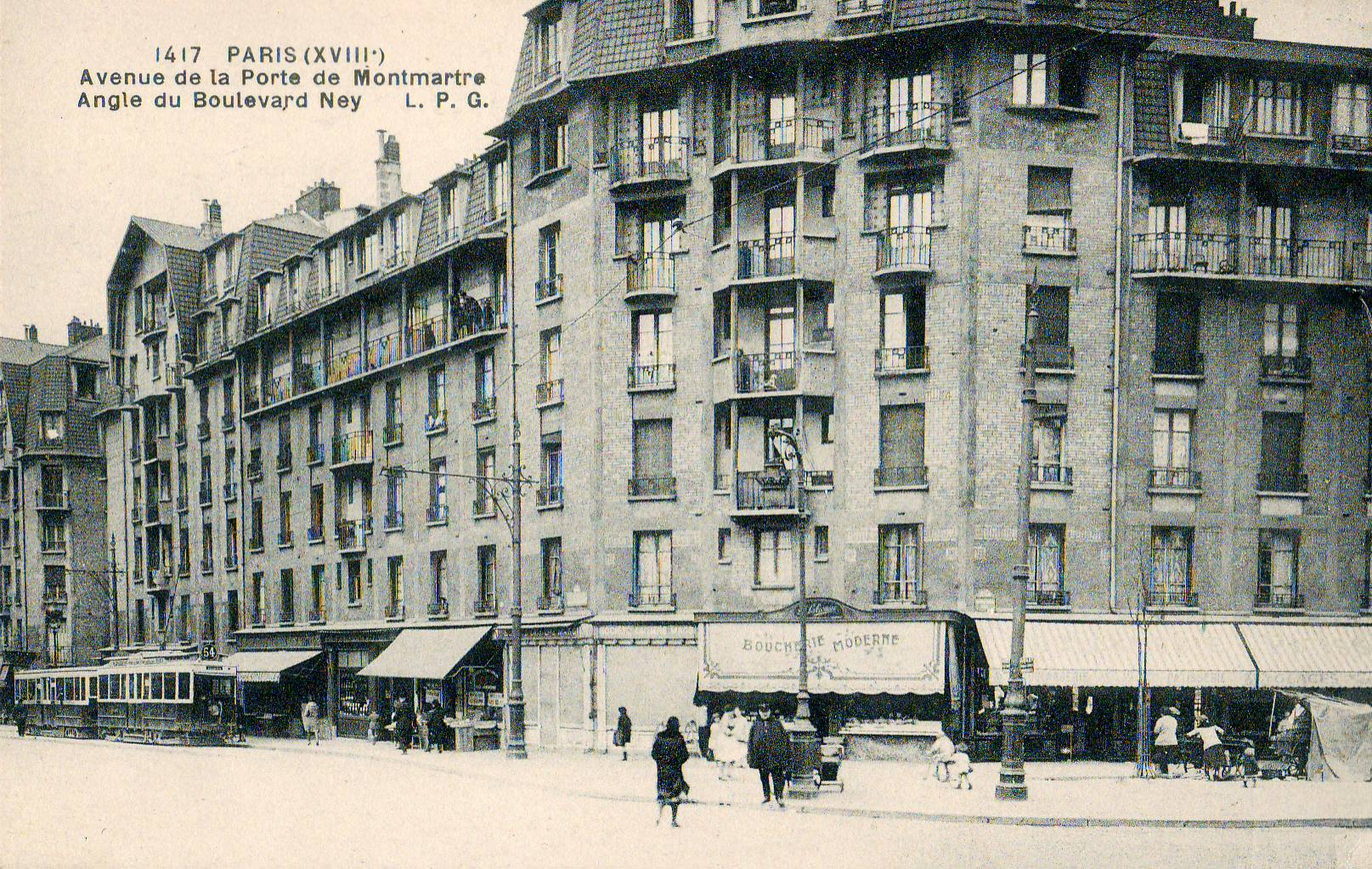 Carte postale éditée par LPG, N°1417Paris (XVIIIe arrondissement) : Avenue de la Porte de Montmartre - Angle du Boulebard NeyVue du tramway 54 de la STCRP (Tramway Enghien - Trinité) devant les HBM de la Ville de Paris